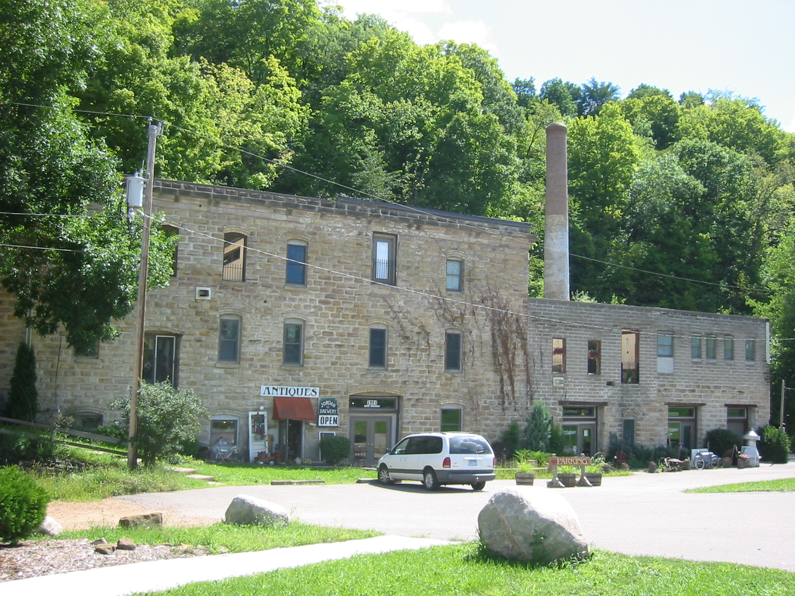 Jordan Brewery Ruins in Jordan, Minnesota.